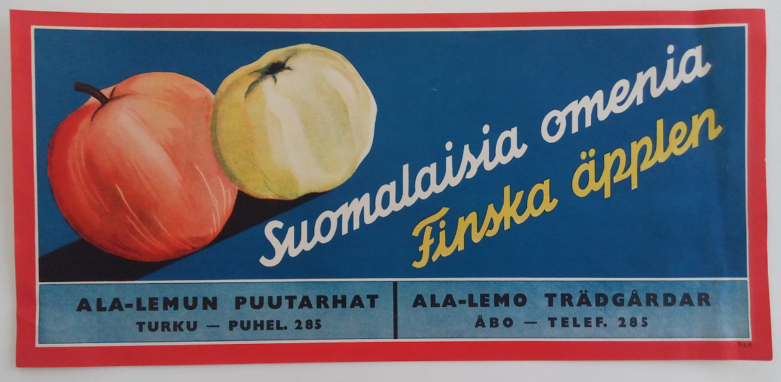 Omenalaatikon mainos